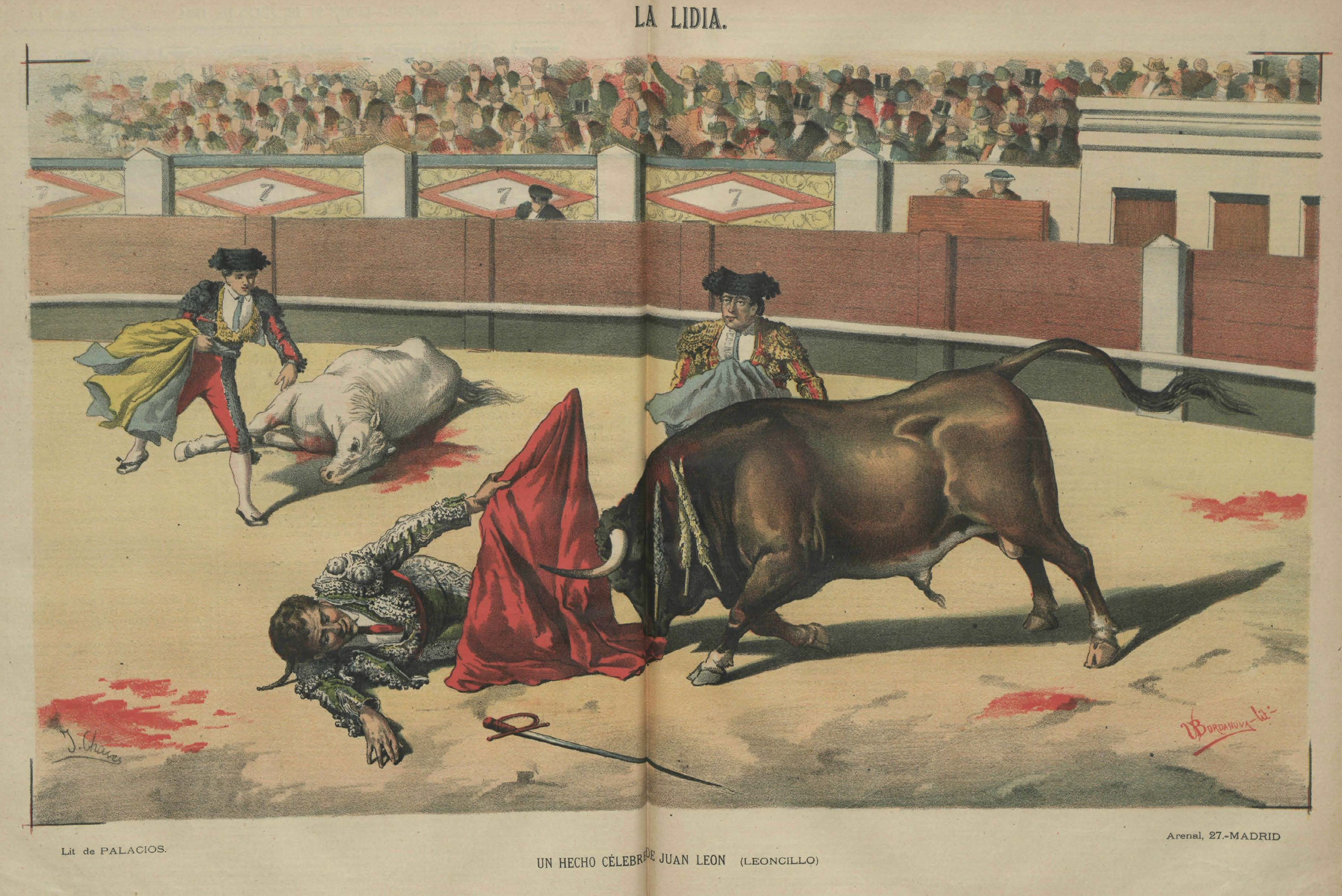 Un hecho célebre de Juan León, Leoncillo. Dibujo de J. Chaves, litografía de Bordanova, La Lidia, Madrid, 21 de julio de 1884. Biblioteca Nacional de España